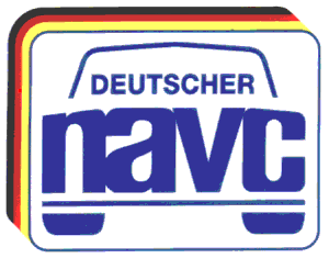 Das Logo des Deutschen NAVC farbig